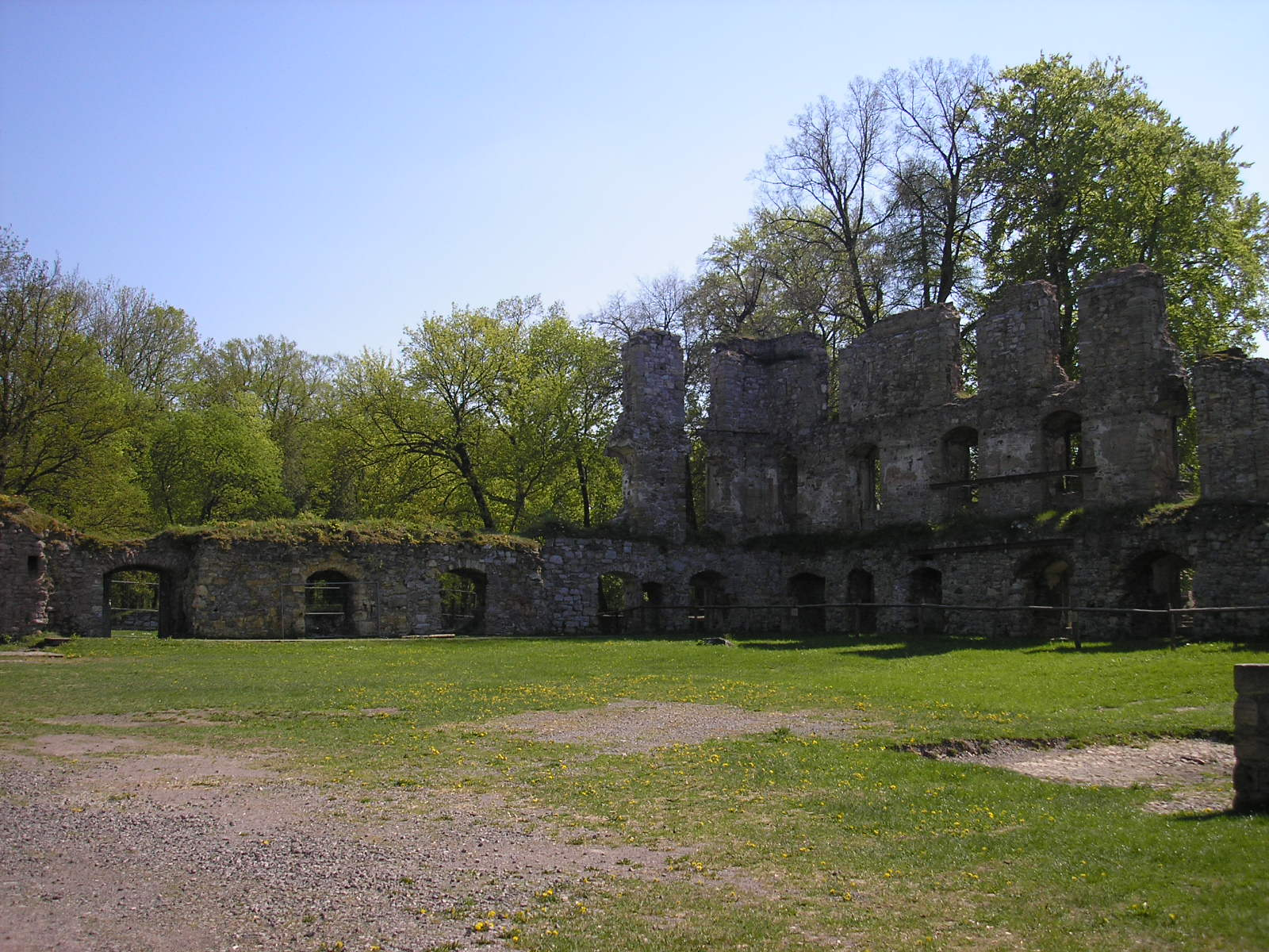 Schlossruine in Gehren (Ilm-Kreis, Thüringen).